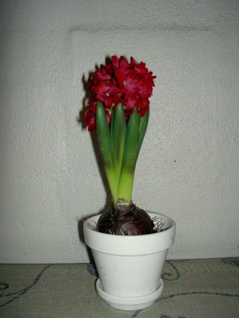 Hyacint